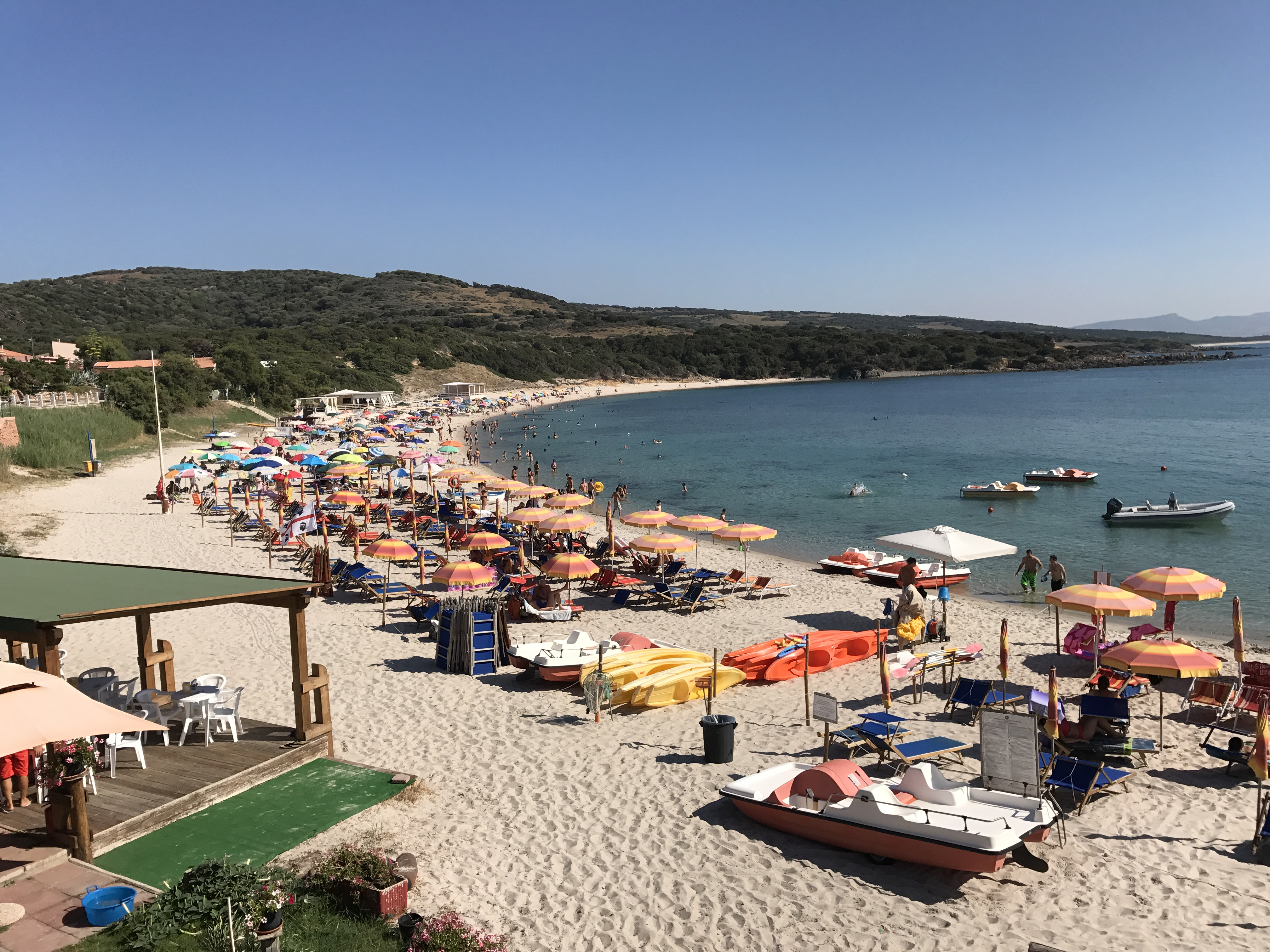 Image d'Isola Rossa, Sardaigne, Italie.